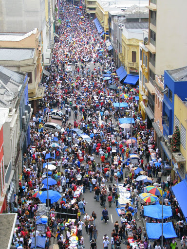 Rua 25 de março em São Paulo - 2008